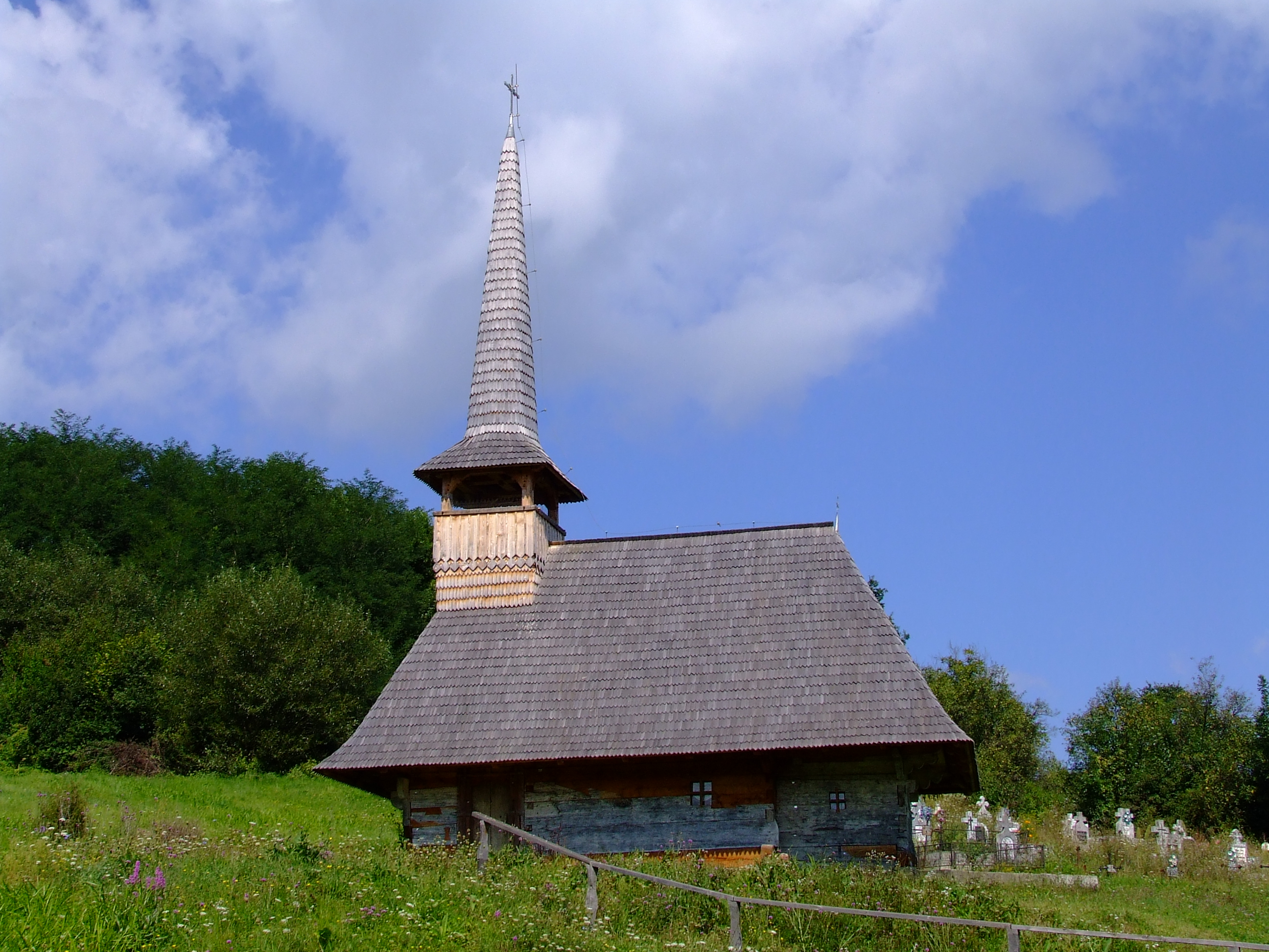 Biserica de lemn din Prodăneşti cu hramul Sfântul Gheorghe. Judeţul Sălaj. Autor: Bogdan Ilieş Data: 24 august 2006